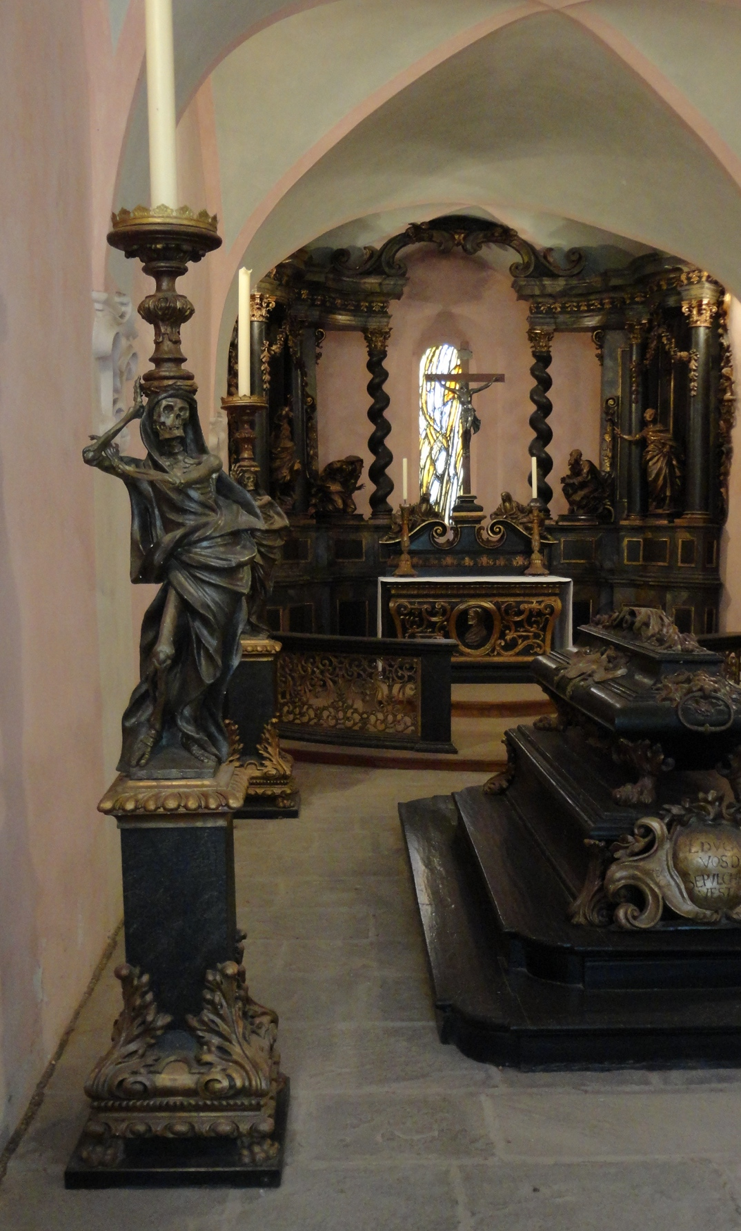 Stifts-, Bernardi- u. Kreuzkirche Konvent Bibliotheks-, Gäste- u. Klerikertrakt: Totenkapelle